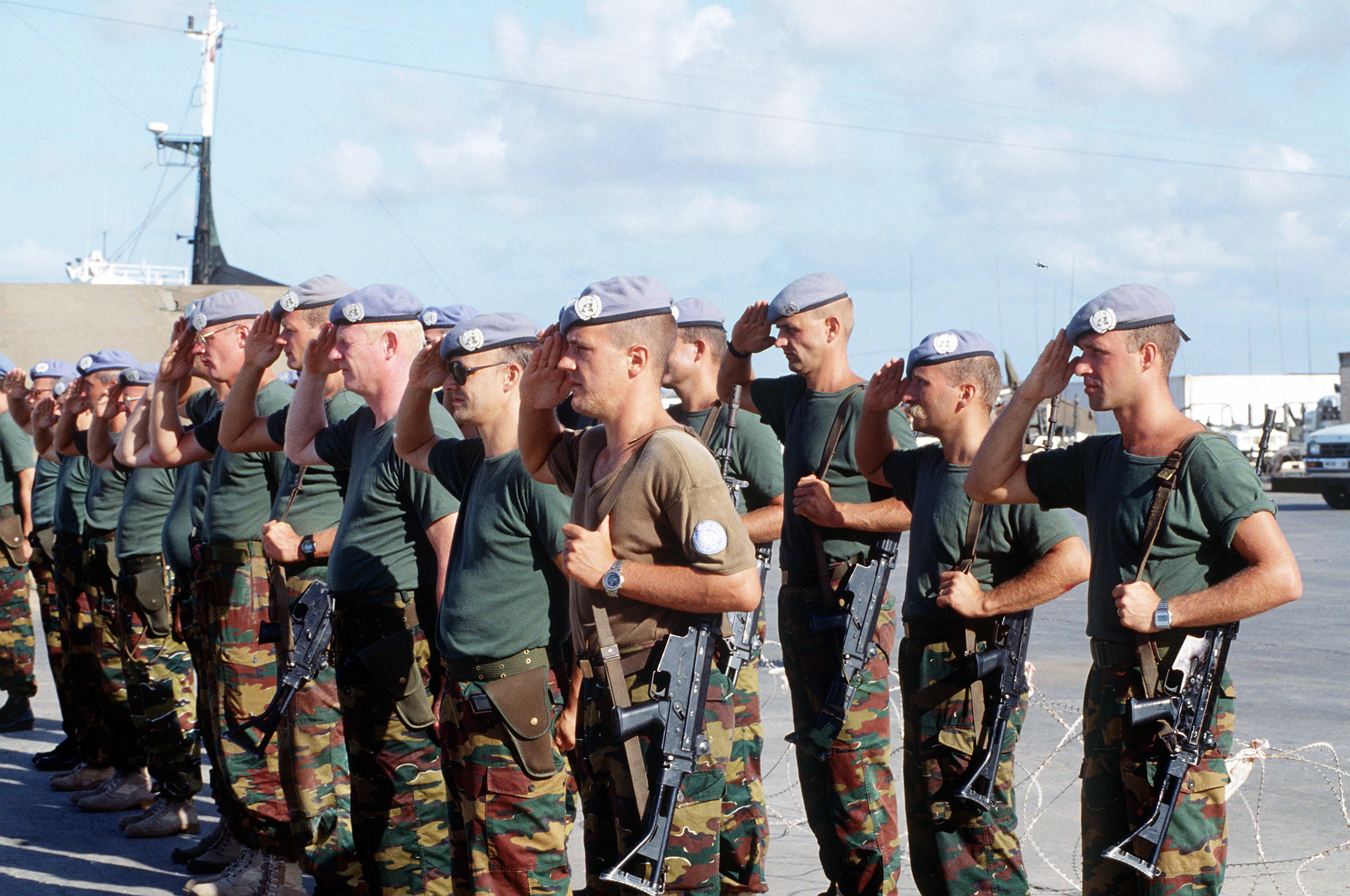 The Belgian soldiers are part of the United Nations Forces in Somalia in support of OPERATION CONTINUE HOPE